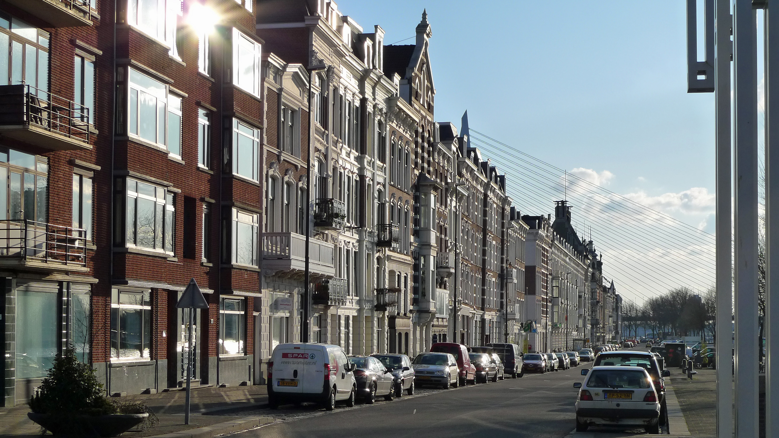 Maaskade - Noordereiland - Rotterdam (Netherlands)